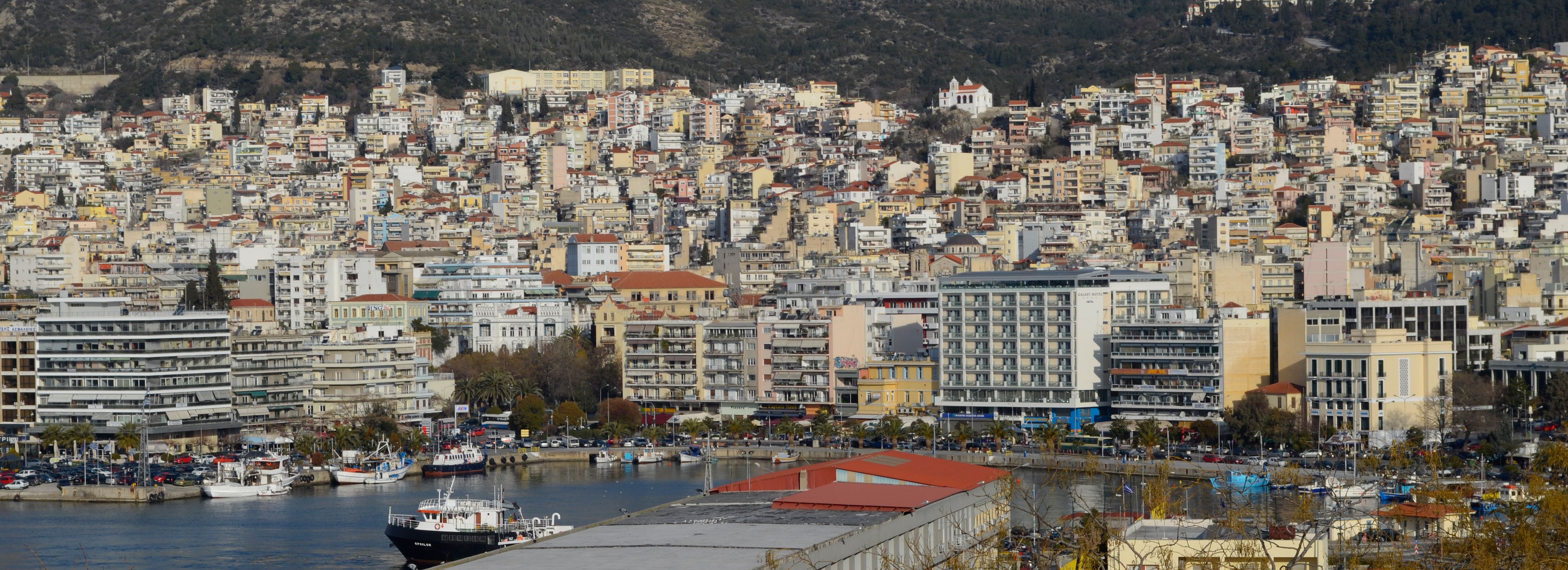 Kavala, Greece